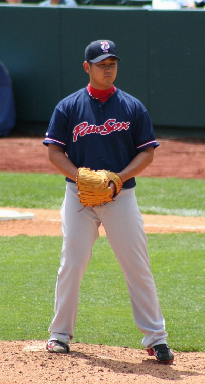 Daisuke Matsuzaka